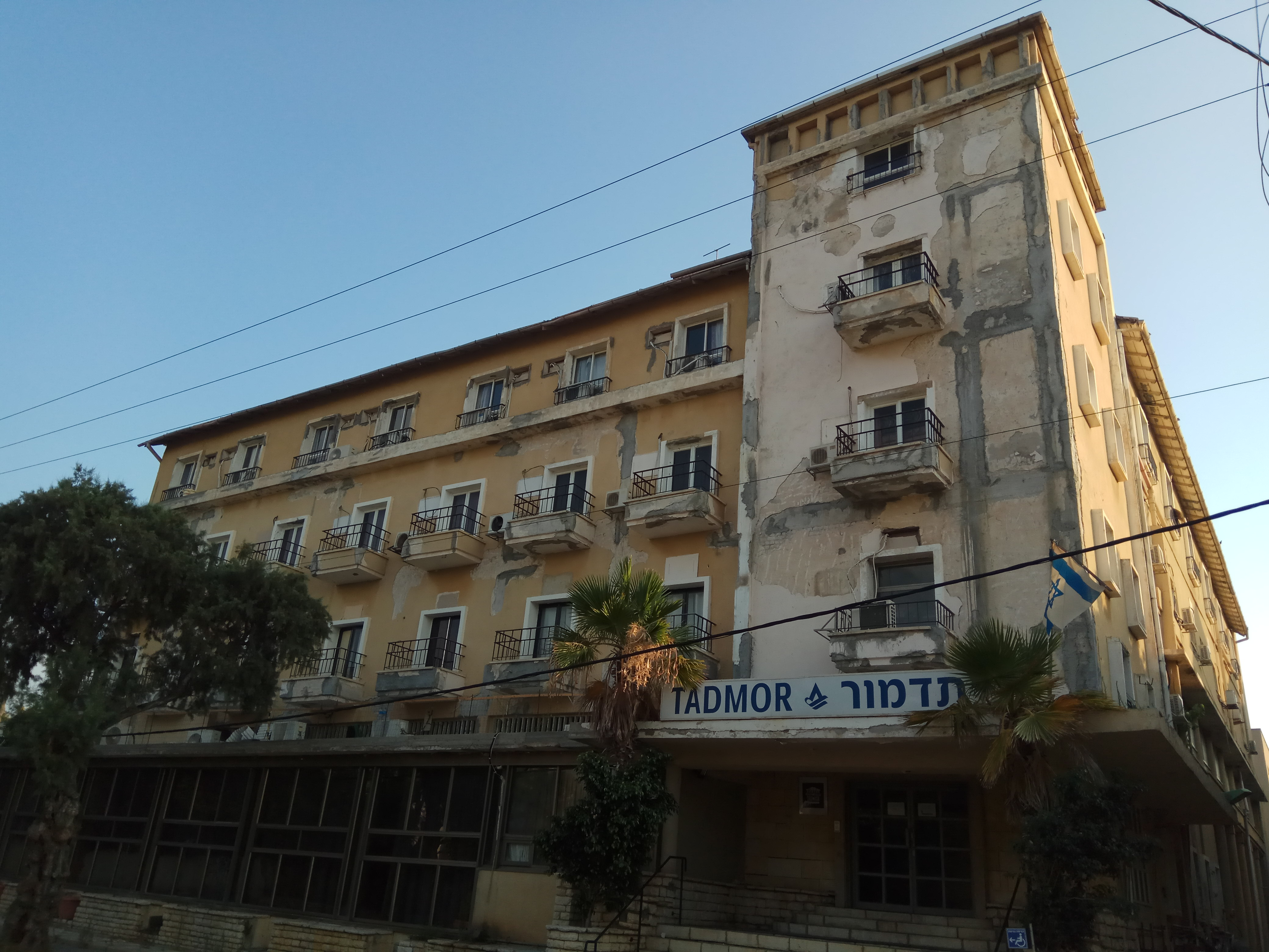 מלון תדמור הנטוש בהרצליה